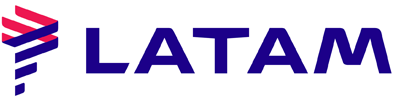 Logo von LATAM Airlines